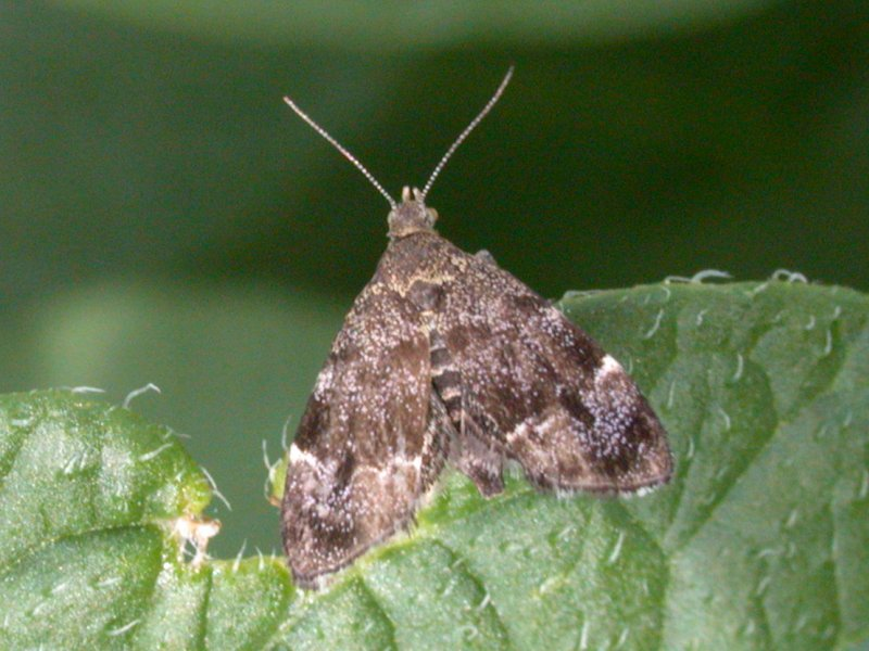 Anthophila fabriciana (Crambidae)